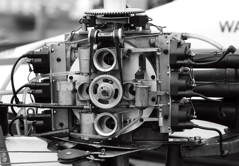 Zweitakt-Sechszylinder-Boxermotor mit vier Vergasern und Flachdrehschieber